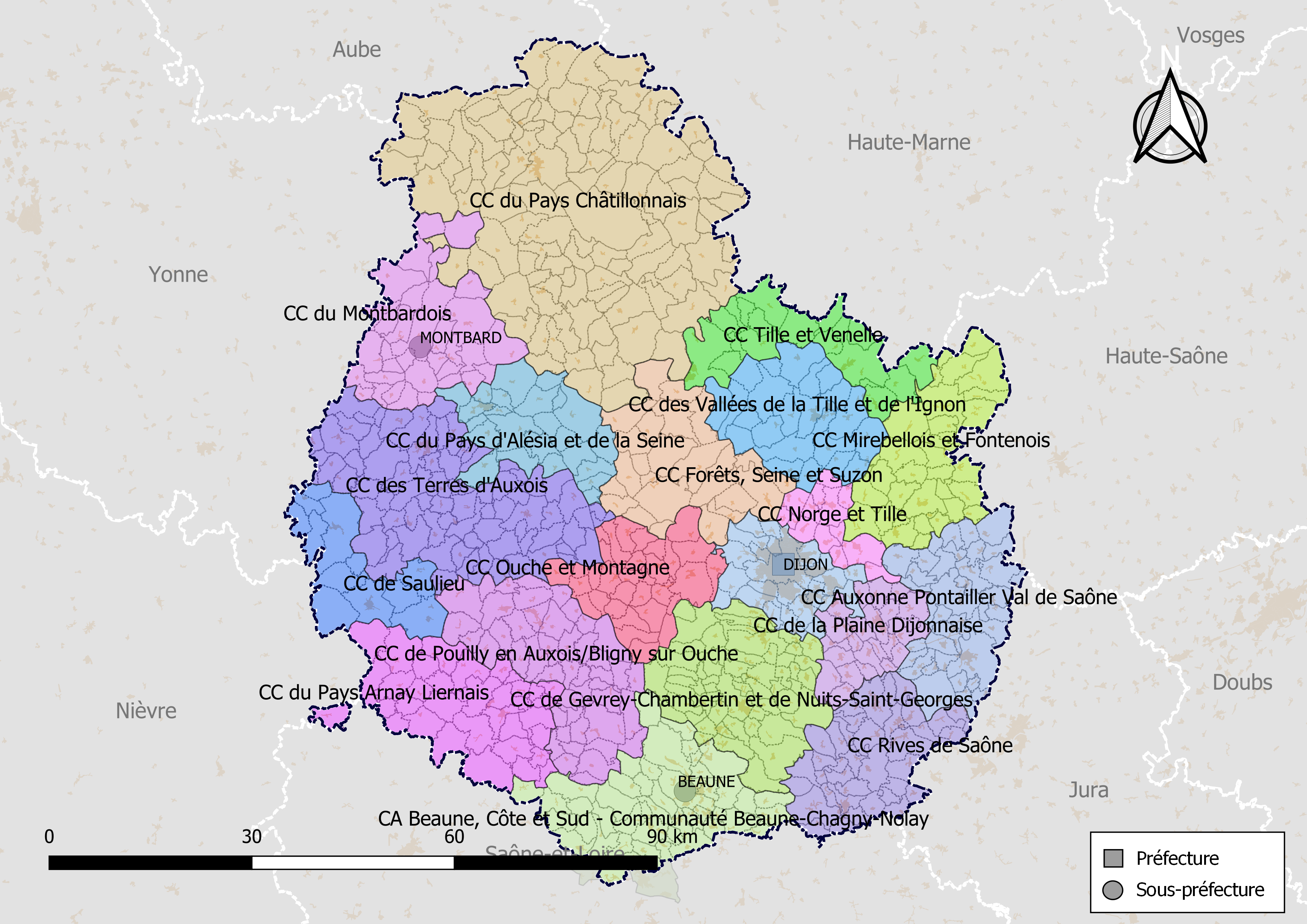 Carte des intercommunalités du département de la Côte-d'Or, France. Composition au 1er janvier 2019